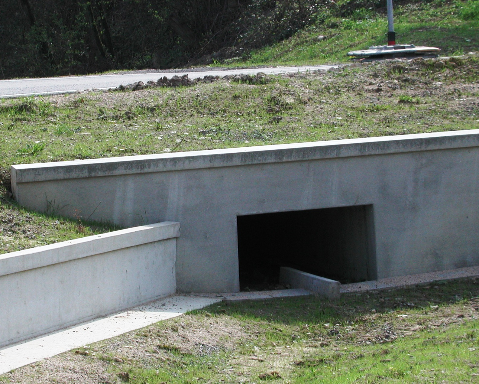 Amphibienschutzanlage mit Kastendurchlass unter der Straße